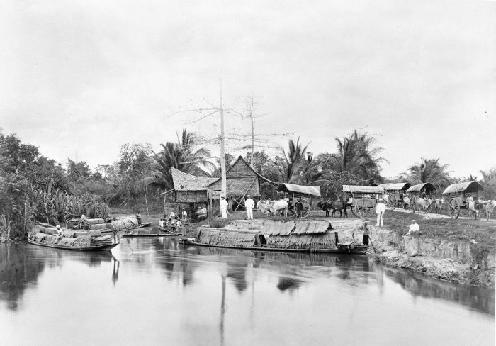 Foto. Overslag van balen tabak van ossenkarren naar boten op de rivier, Tandjong Kassau